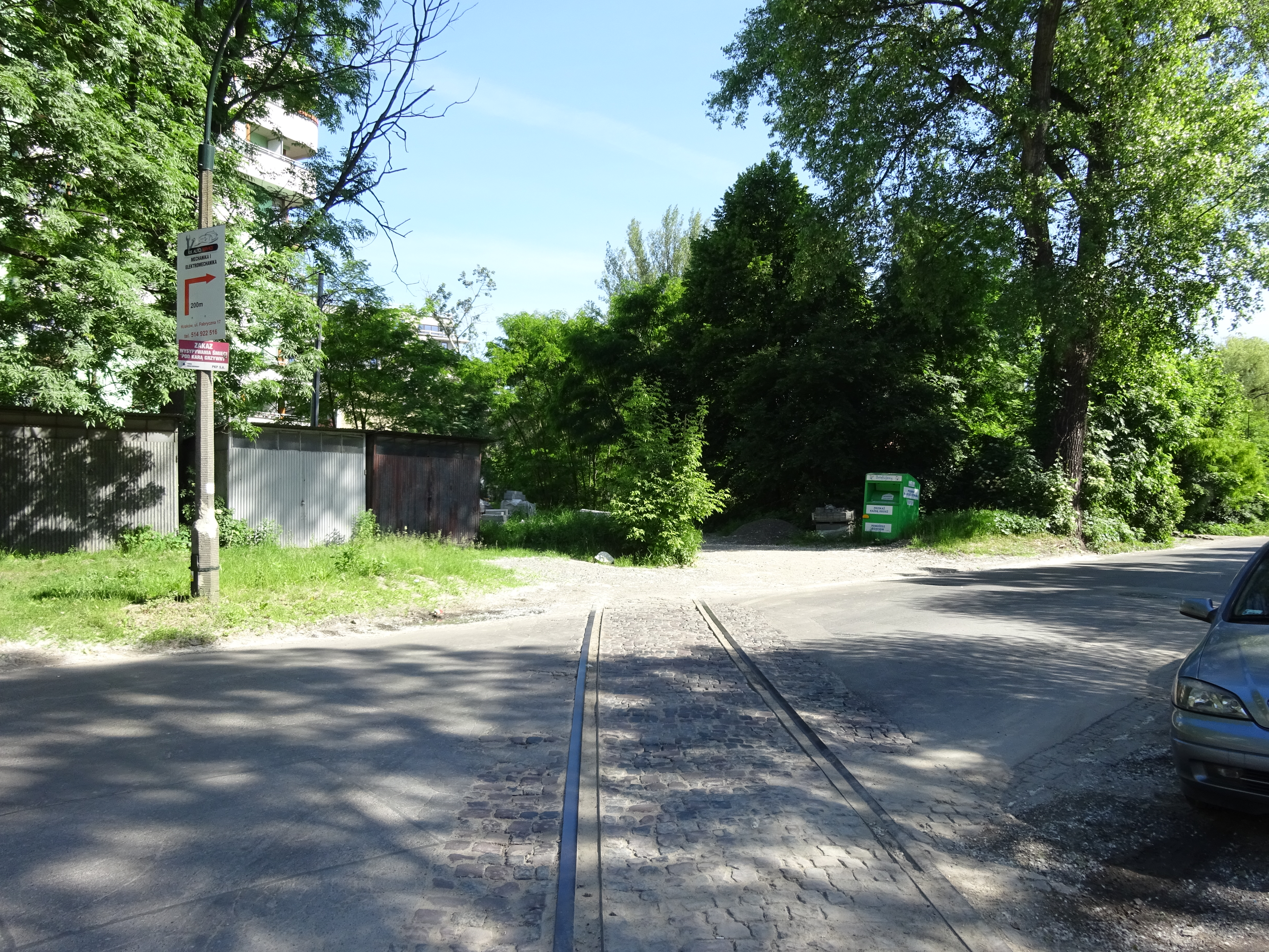 Dawny przejazd przez ul. Fabryczną obecnie zlikwidowanej linii kolejowej nr 111. Kraków, 2017.